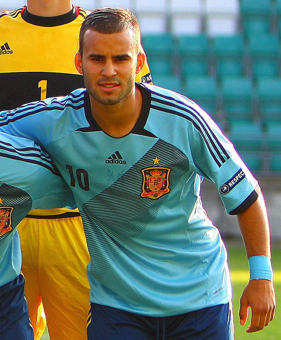 Jesé Rodríguez avec l'équipe d'Espagne de football des moins de 19 ans en 2012.